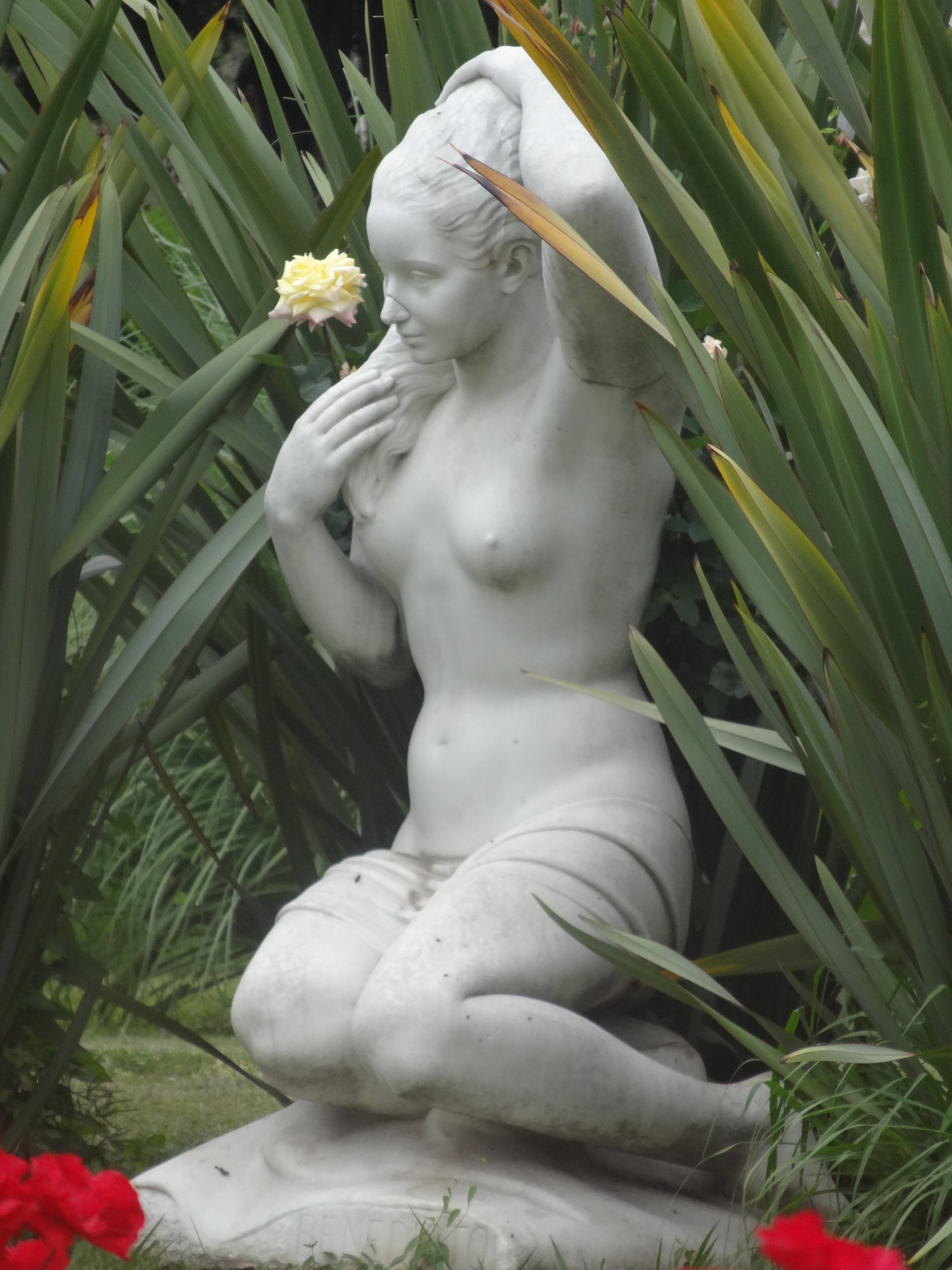 Joventut (Josep Manuel Benedicto). Plaça Francesc Macià, Barcelona.